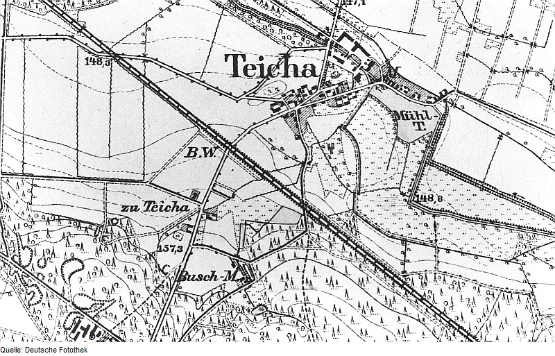 Original image description from the Deutsche FotothekTeicha bei Rietschen. Meßtischblatt, Sekt. Mücka, Nr. 2692, 1887